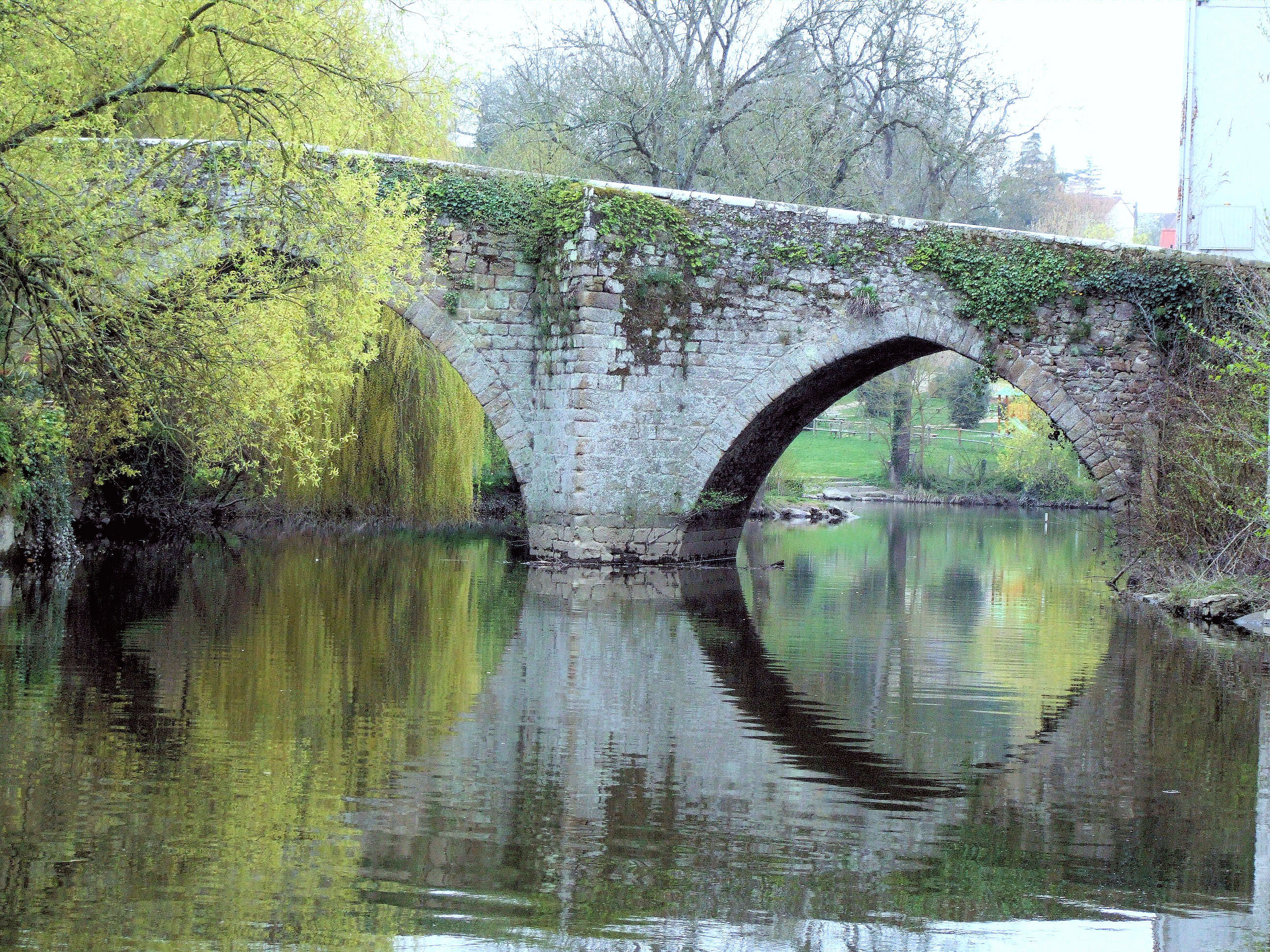 Clisson - Pont Saint-Antoine sur la Moine